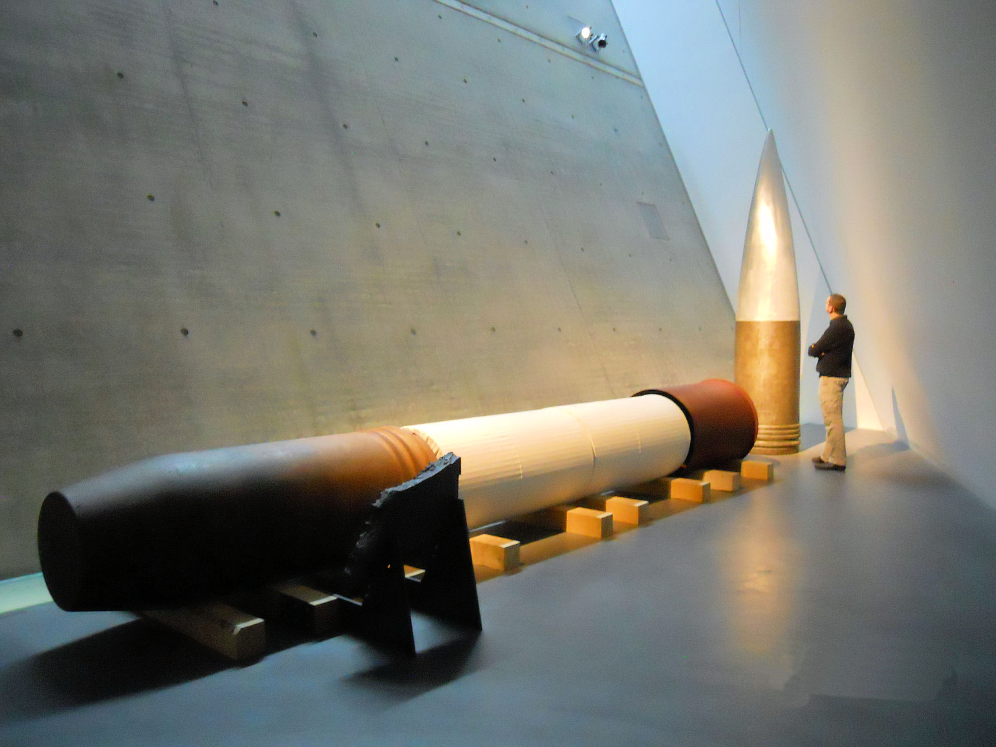 Kartusche mit Treibladung und Geschoss im Hintergrund, Größenvergleich mit Person